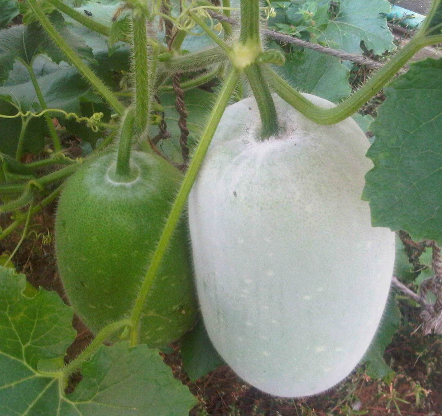 Fotografías de mi huerto de la calabaza china